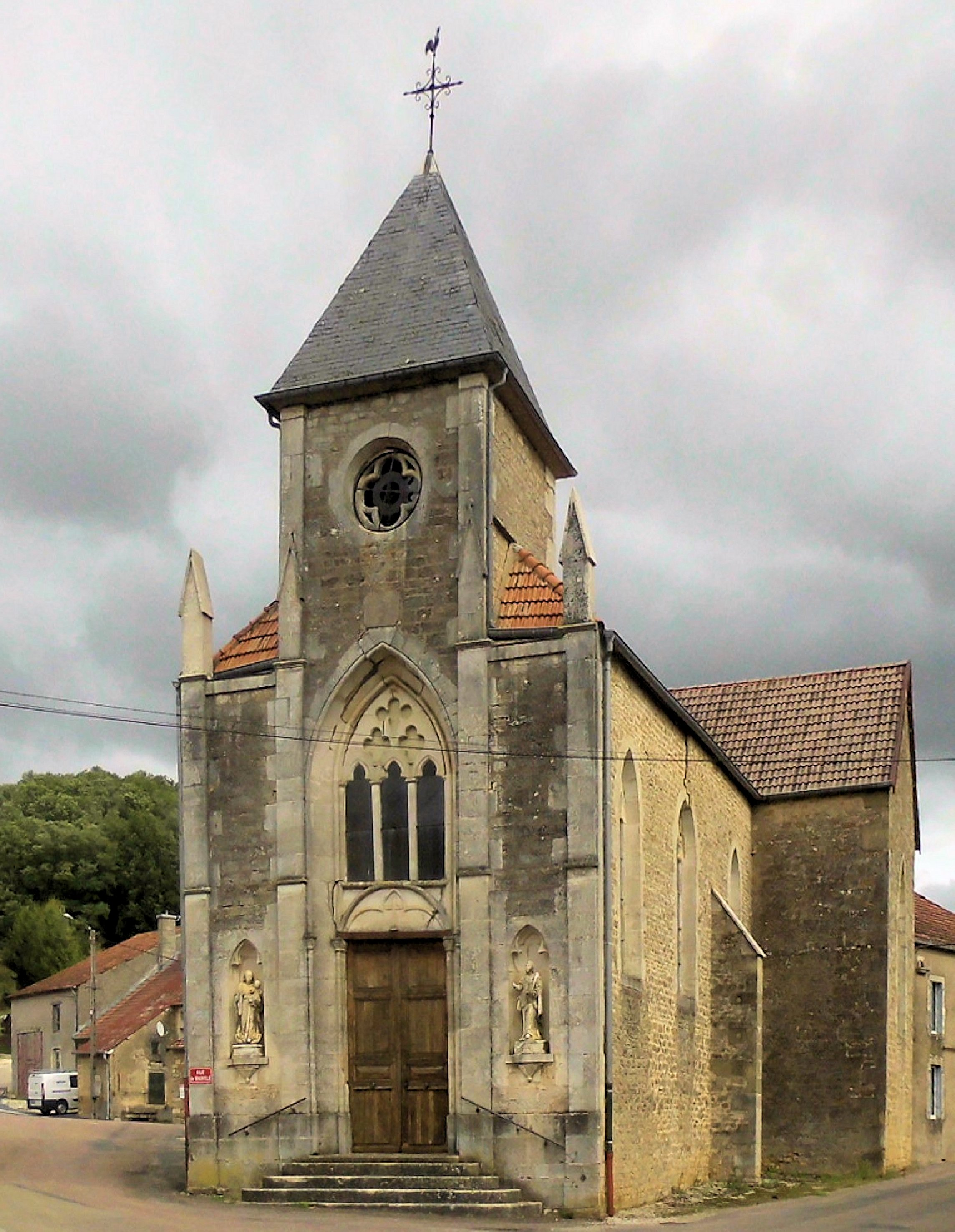 L'église Saint-Loup de Malaincourt-sur-Meuse